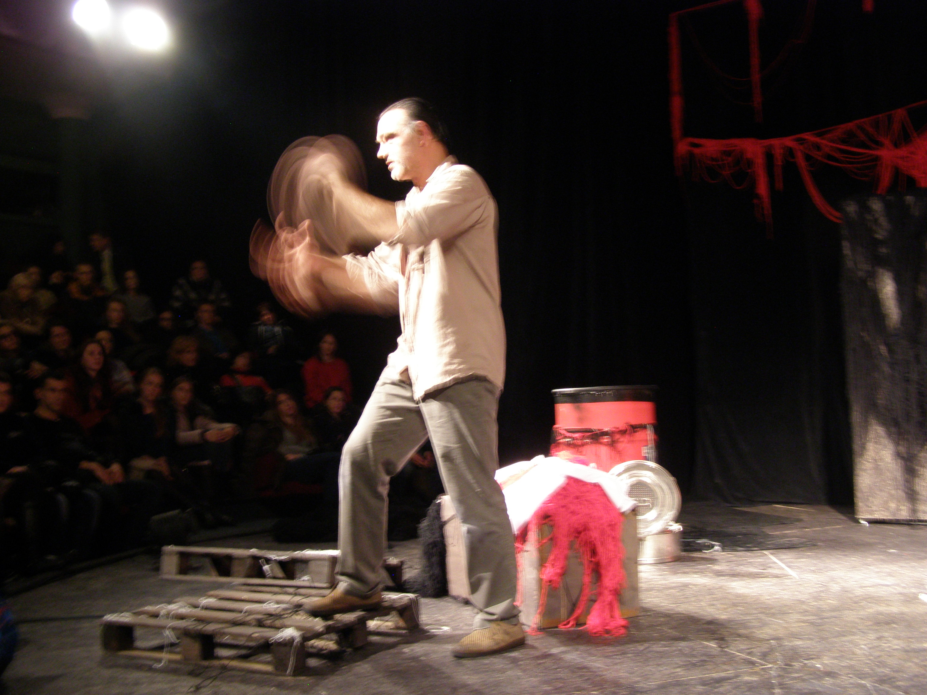 Народний артист України Мельник Михайло Васильович, Академічний український театр одного актора «Крик», вистава «Дикий»